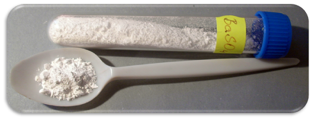 Síran barnatý - BaSO4